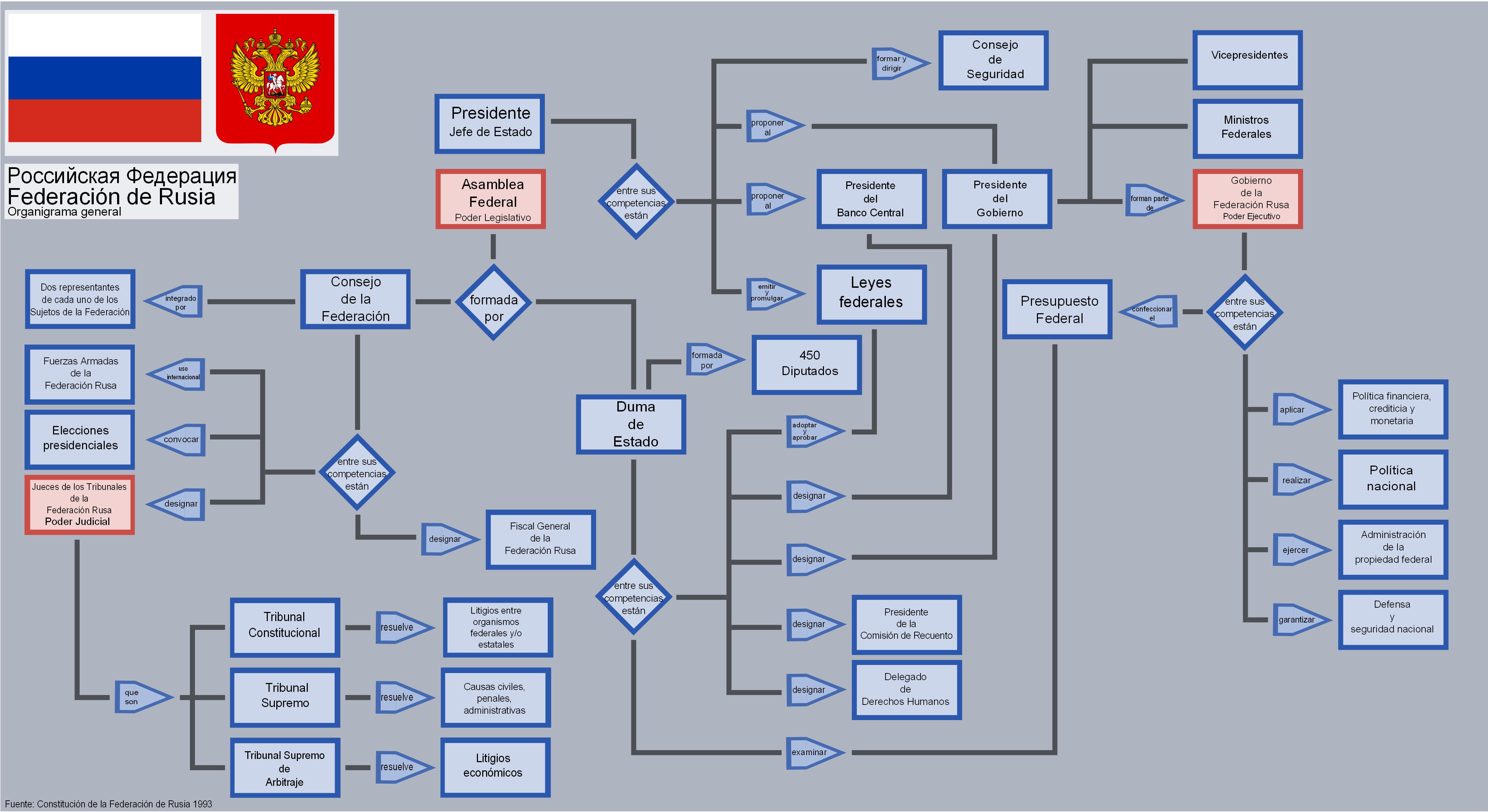 Estructura del Estado de la Federación de Rusia. Fuente: Constitución de la federación de Rusia 1993